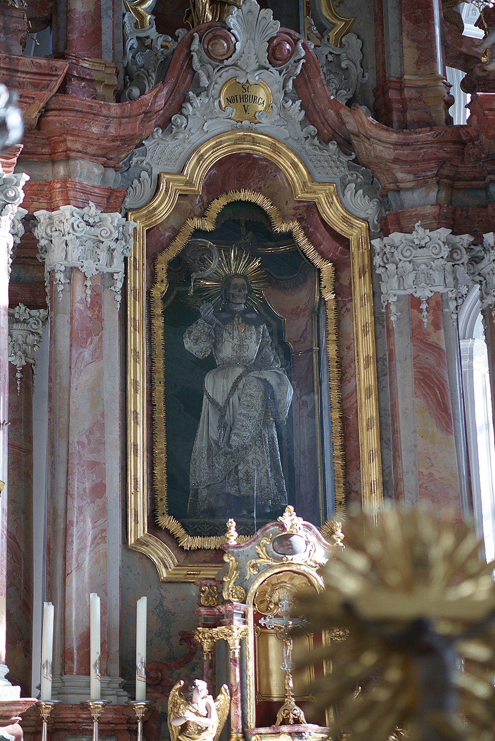 Kath. Pfarr- und Wallfahrtskirche hl. Notburga Schrein der hl. Notburga über dem Hochaltar